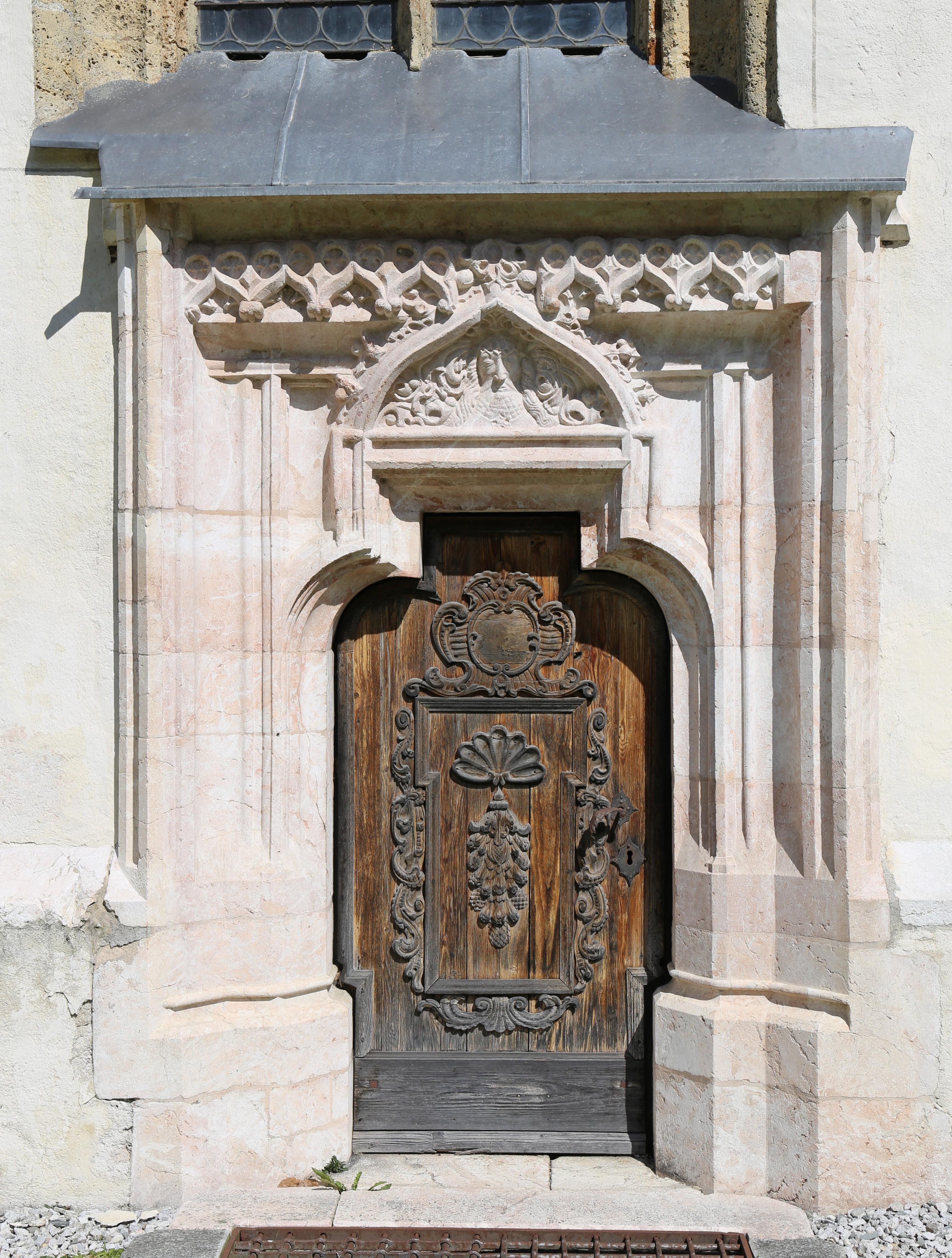 Filialkirche hl. Leonhard, Kundl; spätgotischer Bau mit hohem Turm an der Südwestecke, von Mauer umgeben. Einheitlicher Bau um 1480 bis Anfang 16. Jahrhundert This media shows the remarkable cultural object in the Austrian state of Tyrol listed by the Tyrolean Art Cadastre with the ID 3207. (on tirisMaps, pdf, more images on Commons)